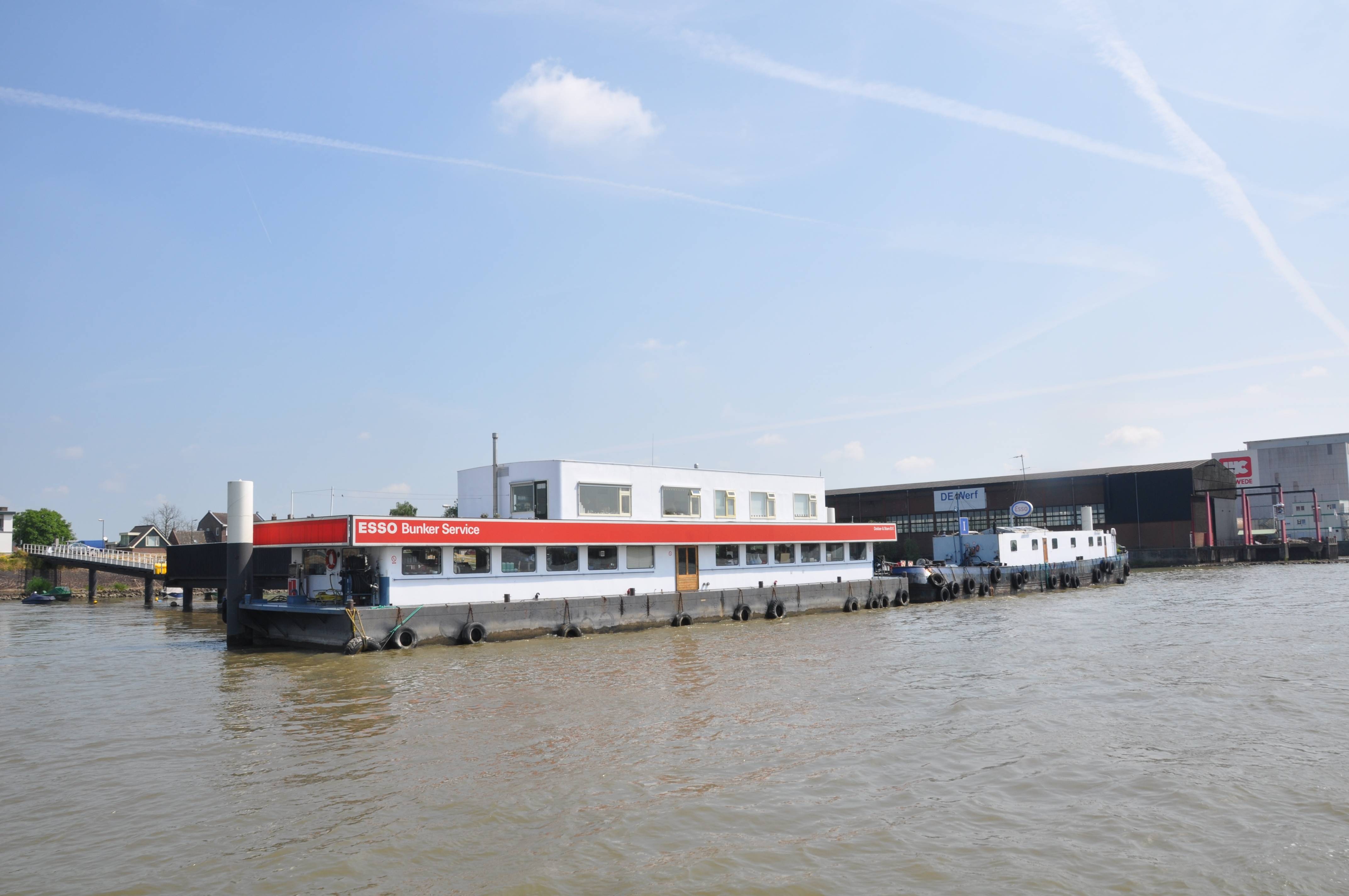 De TERTIO is de ESSO bunkerboot in Hardinxveld